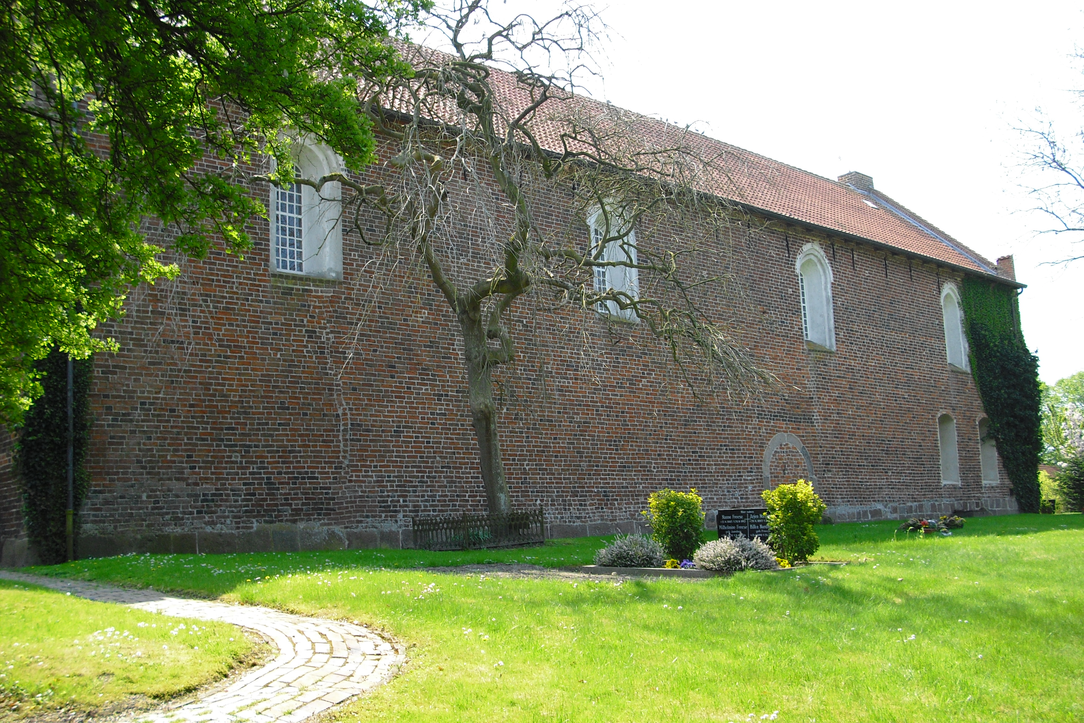 Evangelisch Kirche Westerholt, von Norden aus gesehen